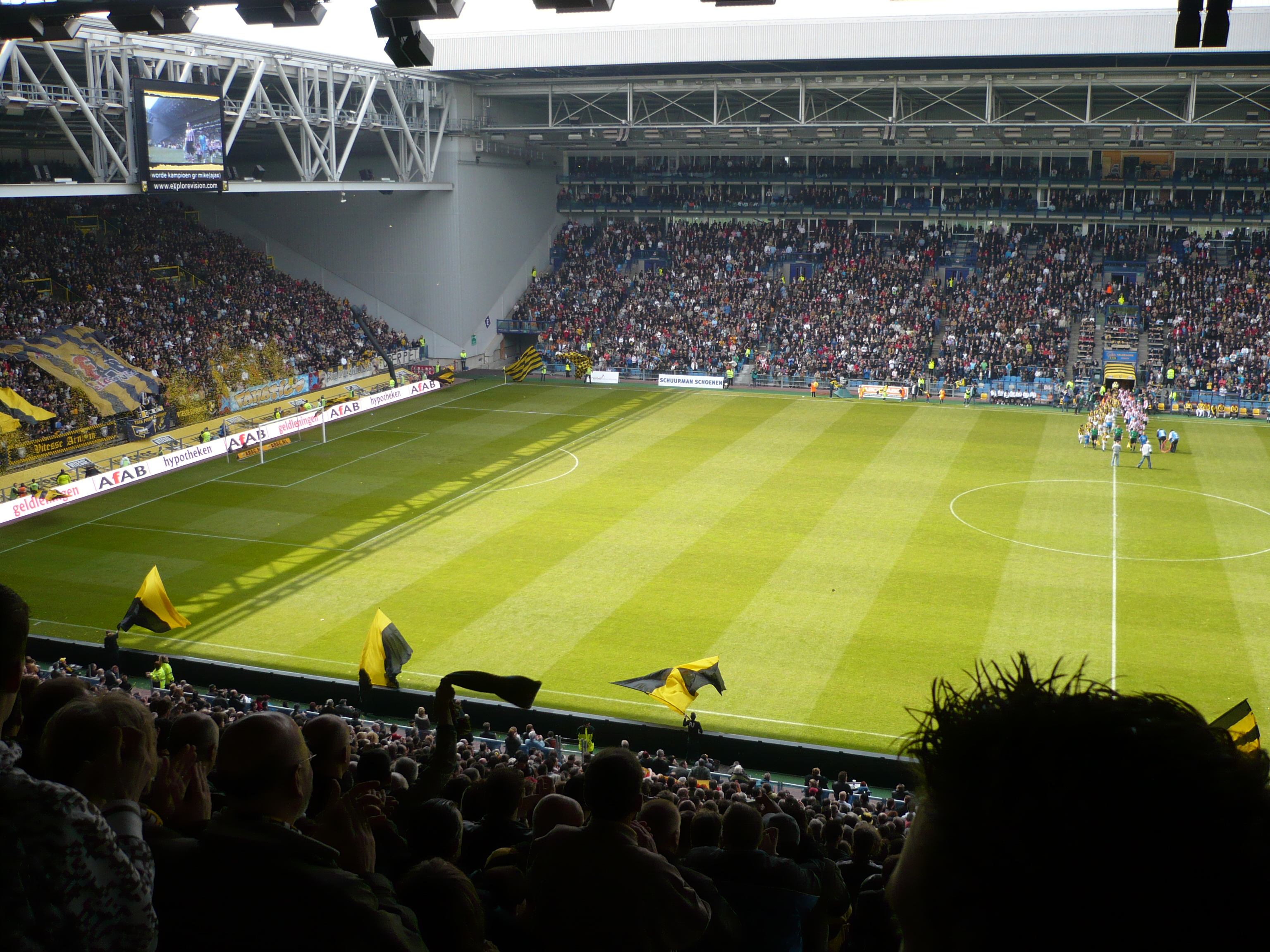 Foto binnenkant Gelredome tijden Vitesse-PSV